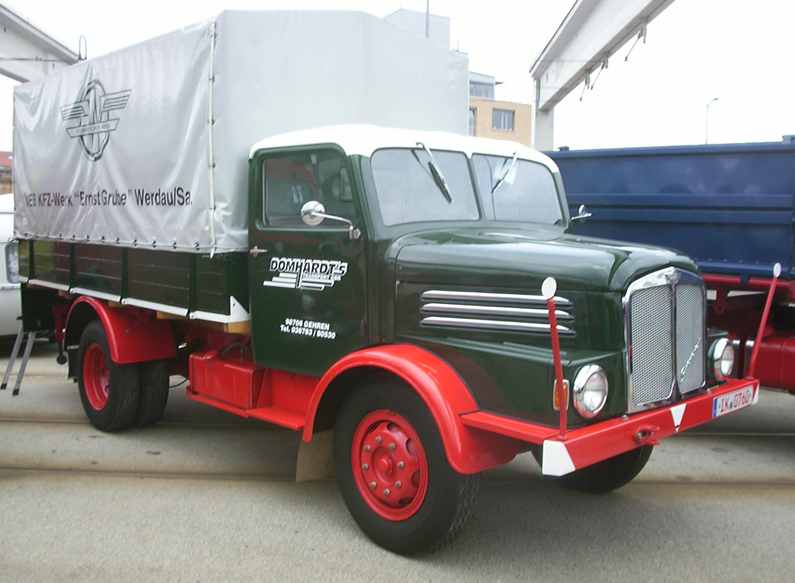 IFA S4000-1, Pritsche mit Plane